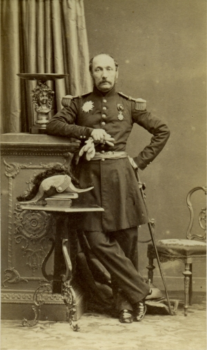 Armand-Octave-Marie d’Allonville (1809-1867)